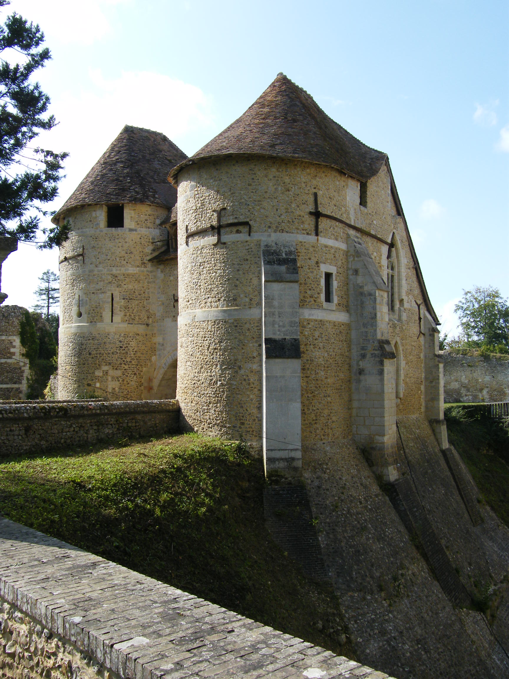 Château d'Harcourt, Eure, France